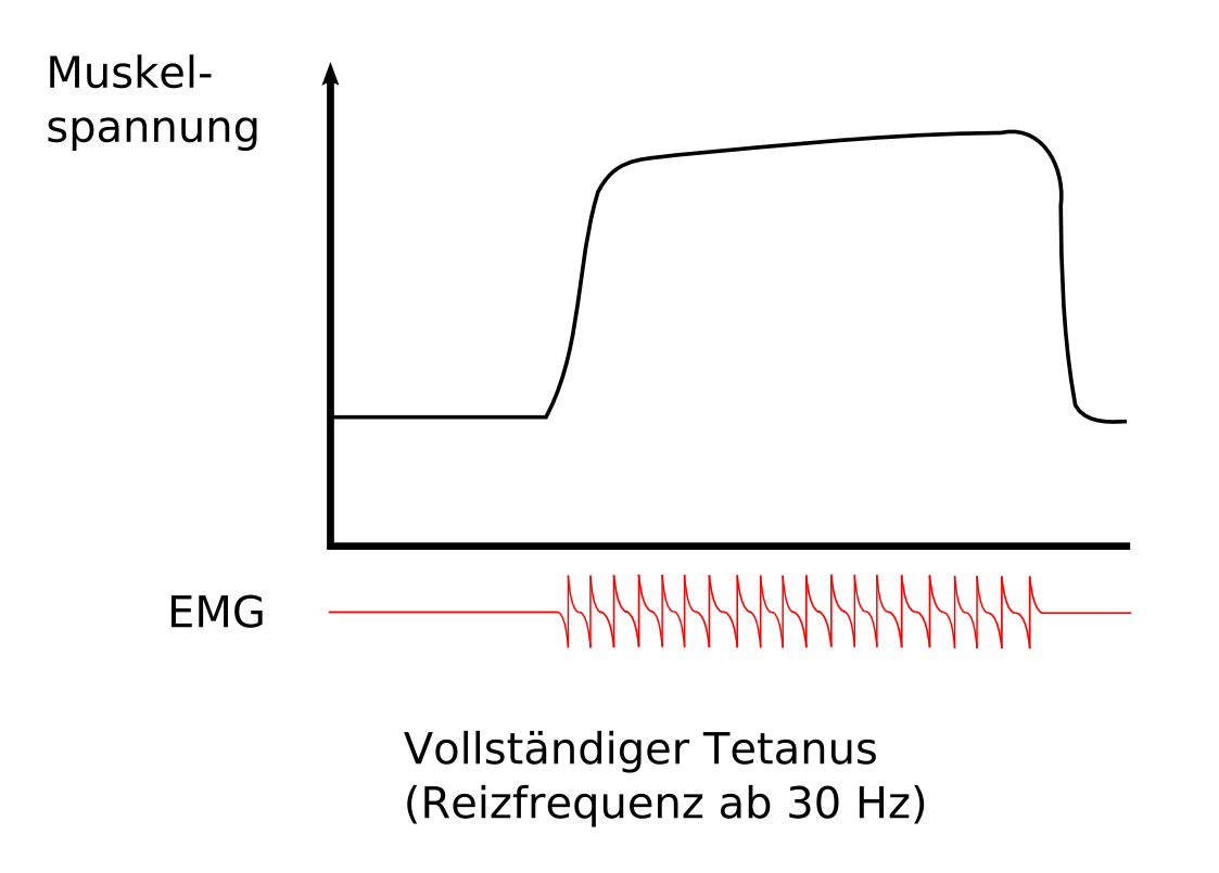 Muskulatur: vollstaendiger Tetanus